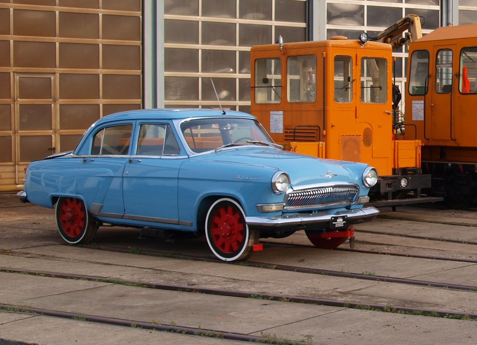 Wolga-Draisine der ehemaligen Jugoslawischen Staatsbahn in Vacha